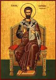 Icone neo-Bizantino de São Barnabé